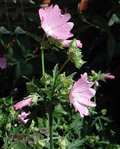 Malva alcea.